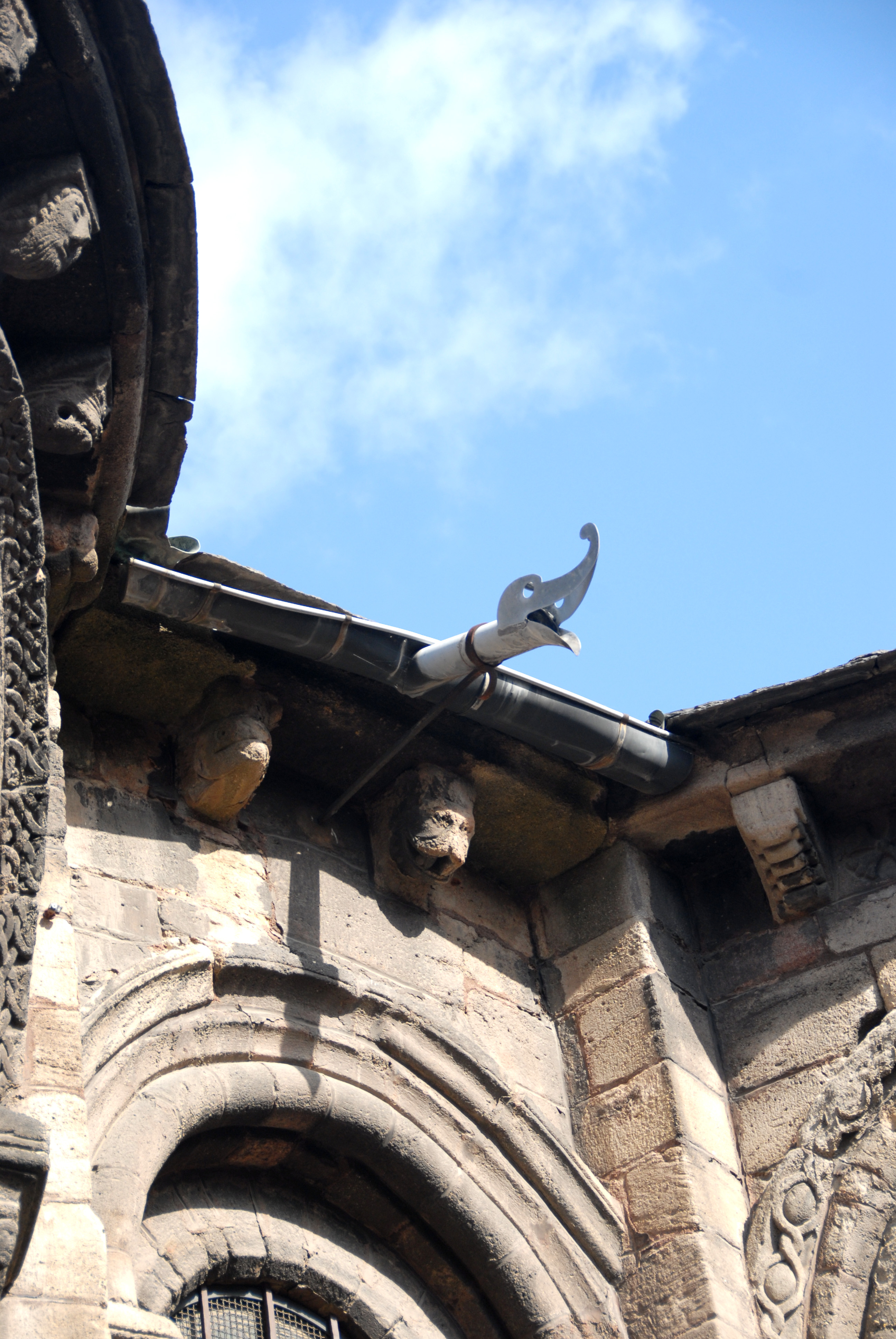 St.-Julien Brioude, Umgang zw. beiden südöstl. Kapellen